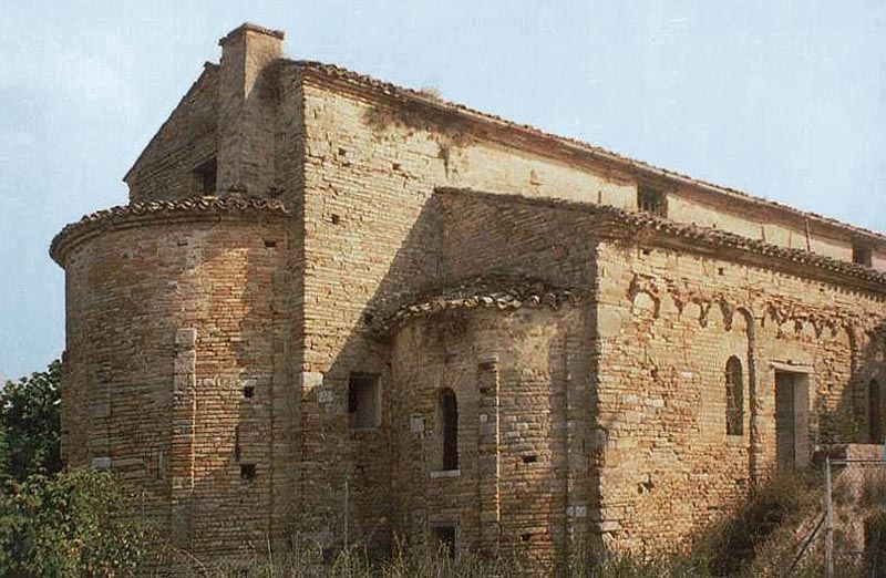 Veduta dell'Abbazzia di Santa Croce al chienti